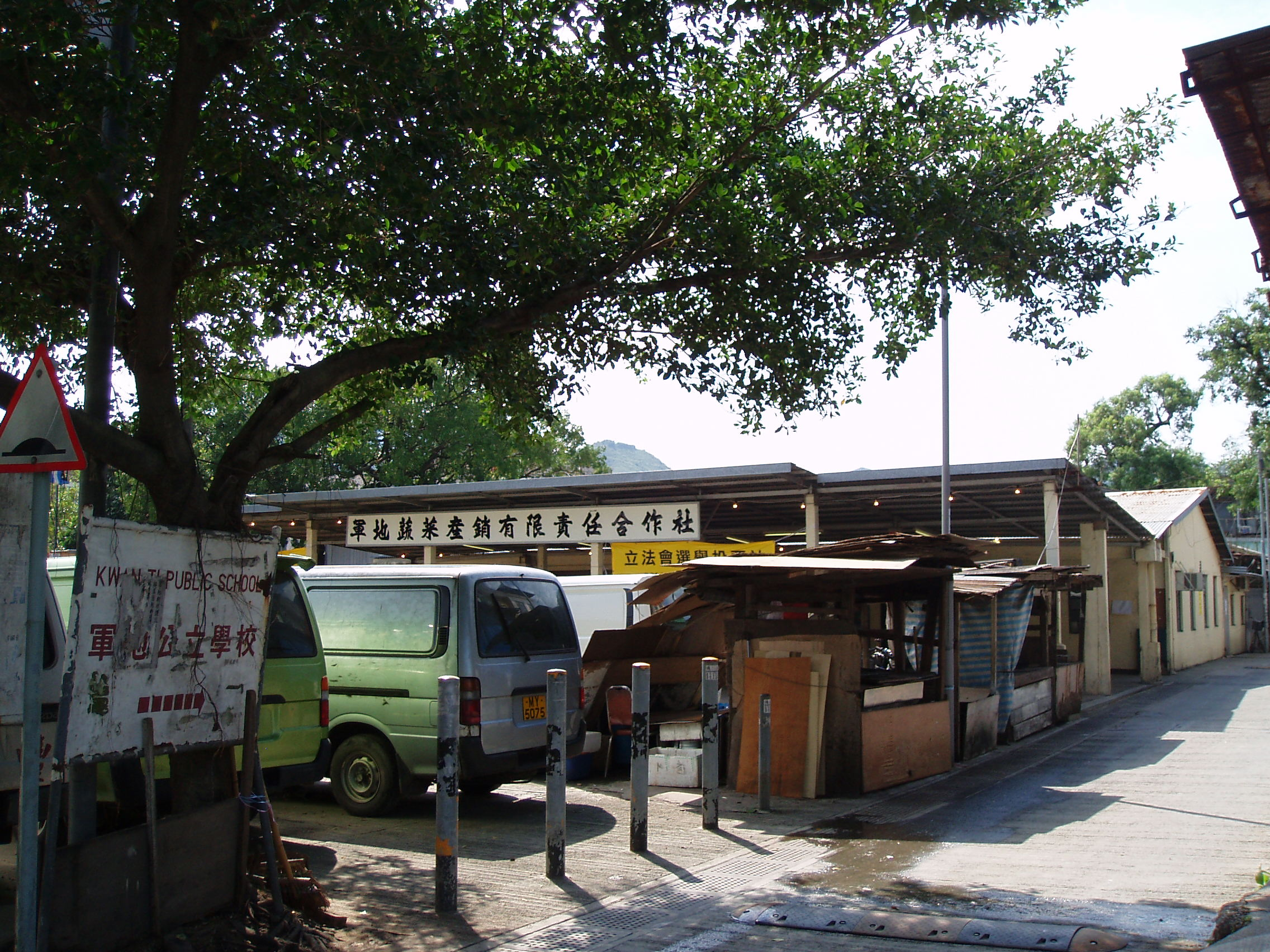 軍地菜站